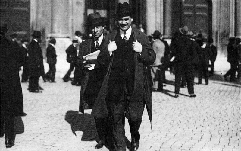 il sindacalista Bruno Buozzi (Roma, 1924).